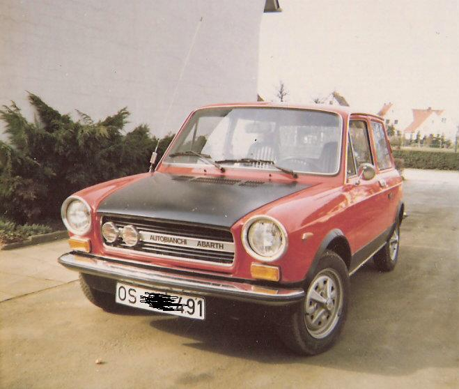 Autobianchi A112 Abarth 1ª serie del 1972